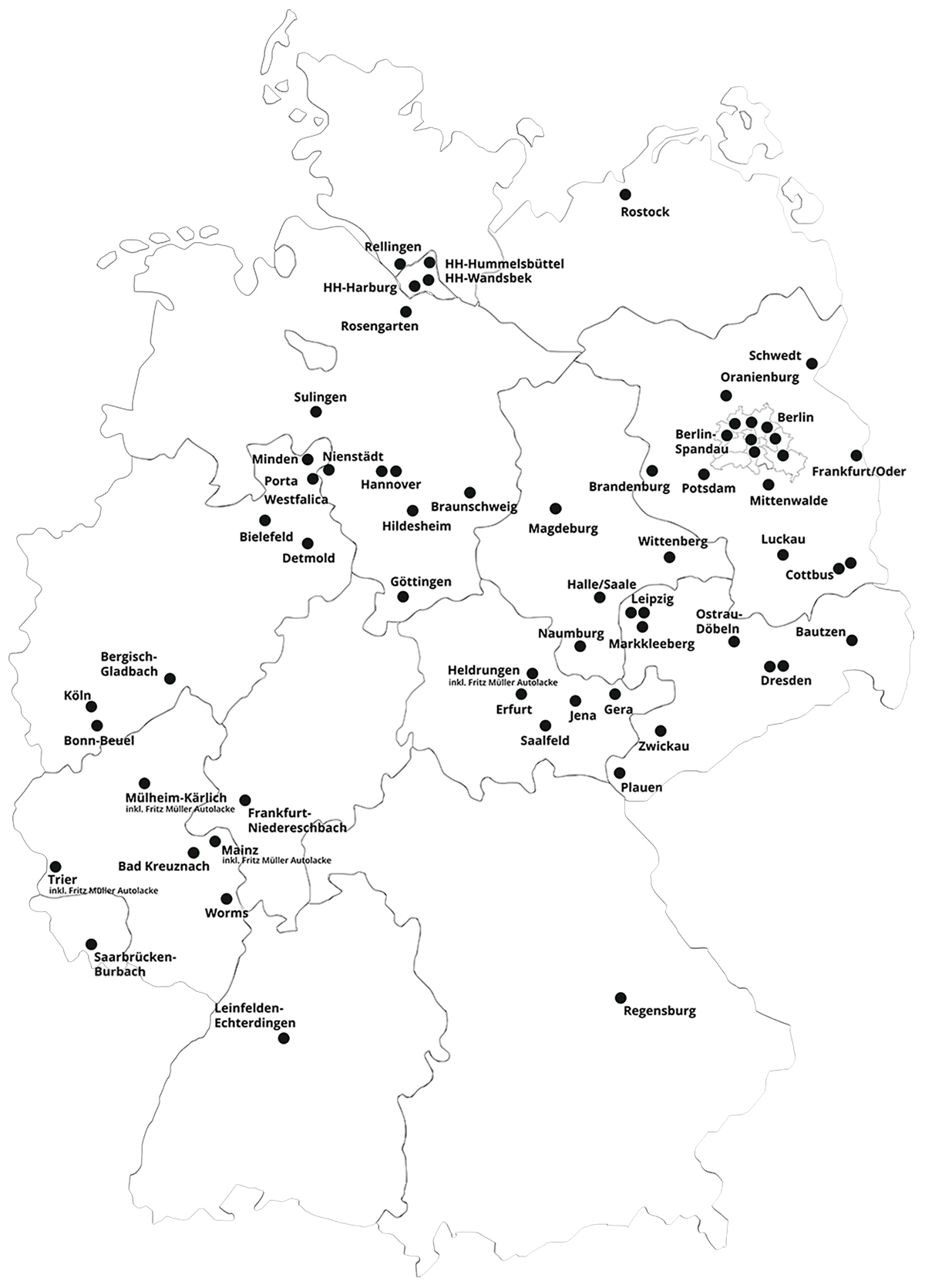 Standort Übersicht Brüder Schlau